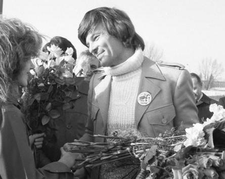 Berlin-Schönefeld, Empfang von Dean Reed ADN-ZB/Mittelstädt: 19.11.78/B/Berlin: Rückkehr von Dean Reed Dem bekannten Sänger, Schauspieler und Friedenskämpfer Dean Reed wurde heute auf dem Flughafen Berlin-Schönefeld bei seiner Rückkehr in die DDR ein überaus herzlicher Empfang zuteil. Reed, der zusammen mit anderen während einer Farmer-Demonstration verhaftet worden war, mußte vom Gericht in Buffalo auf Grund der Haltlosigkeit der Anklage und auch unter dem Eindruck der weltweiten Proteste gegen Willkürakt freigesprochen werden. Abgebildete Personen: Reed, Dean: Schauspieler, Folkloresänger, Mitglied des Weltfriedensrates, USA (GND 118598929)